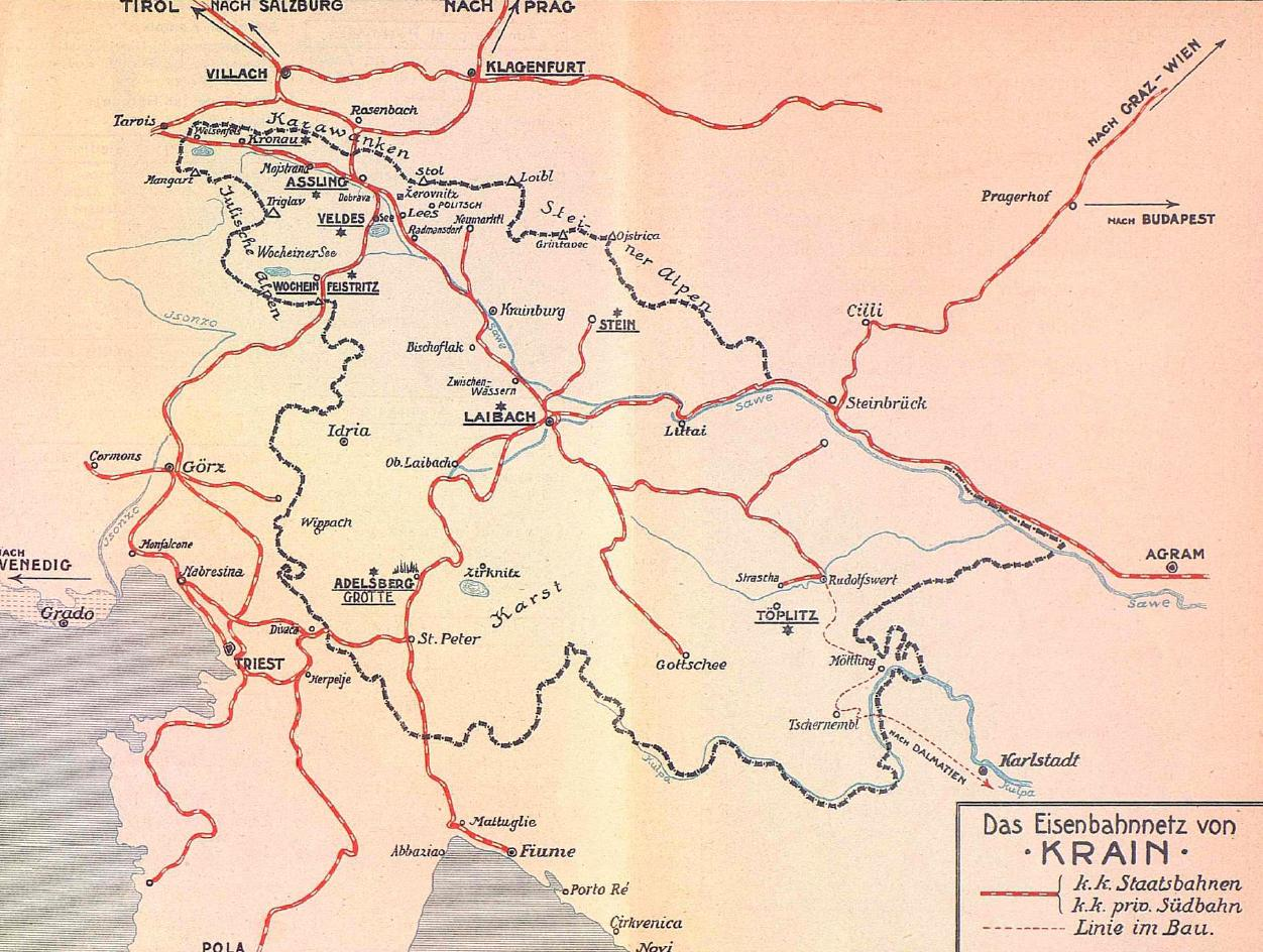 Kranjska